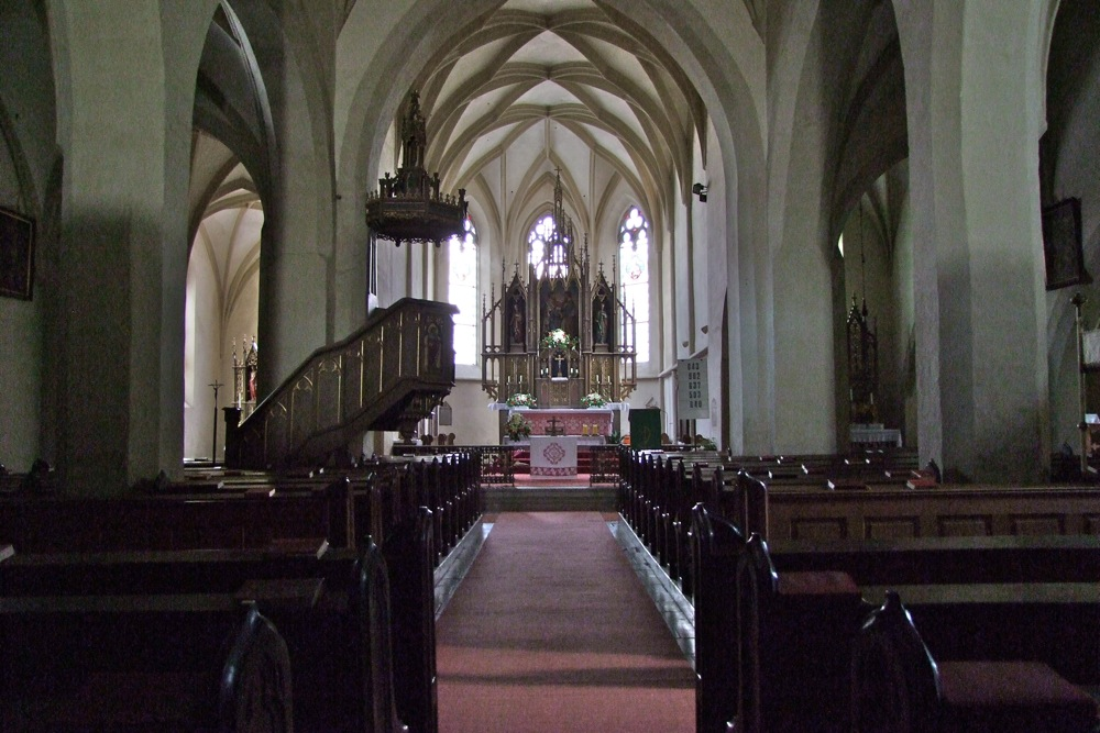 Erlaa ehem Stiftskirche